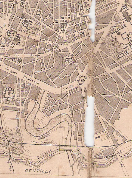 Plan de la zone de la Bièvre, à Paris, avec la manufacture des Gobelins. La Bièvre se jette dans la Seine en amont du Pont d'Austerlitz (coin supérieur droit de la photo)